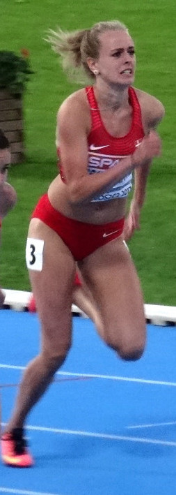 Młodzieżowe Mistrzostwa Europy w Lekkoatletyce U23 w Bydgoszczy 13-16 lipca 2017, półfinał biegu na 100 m przez płotki kobiet